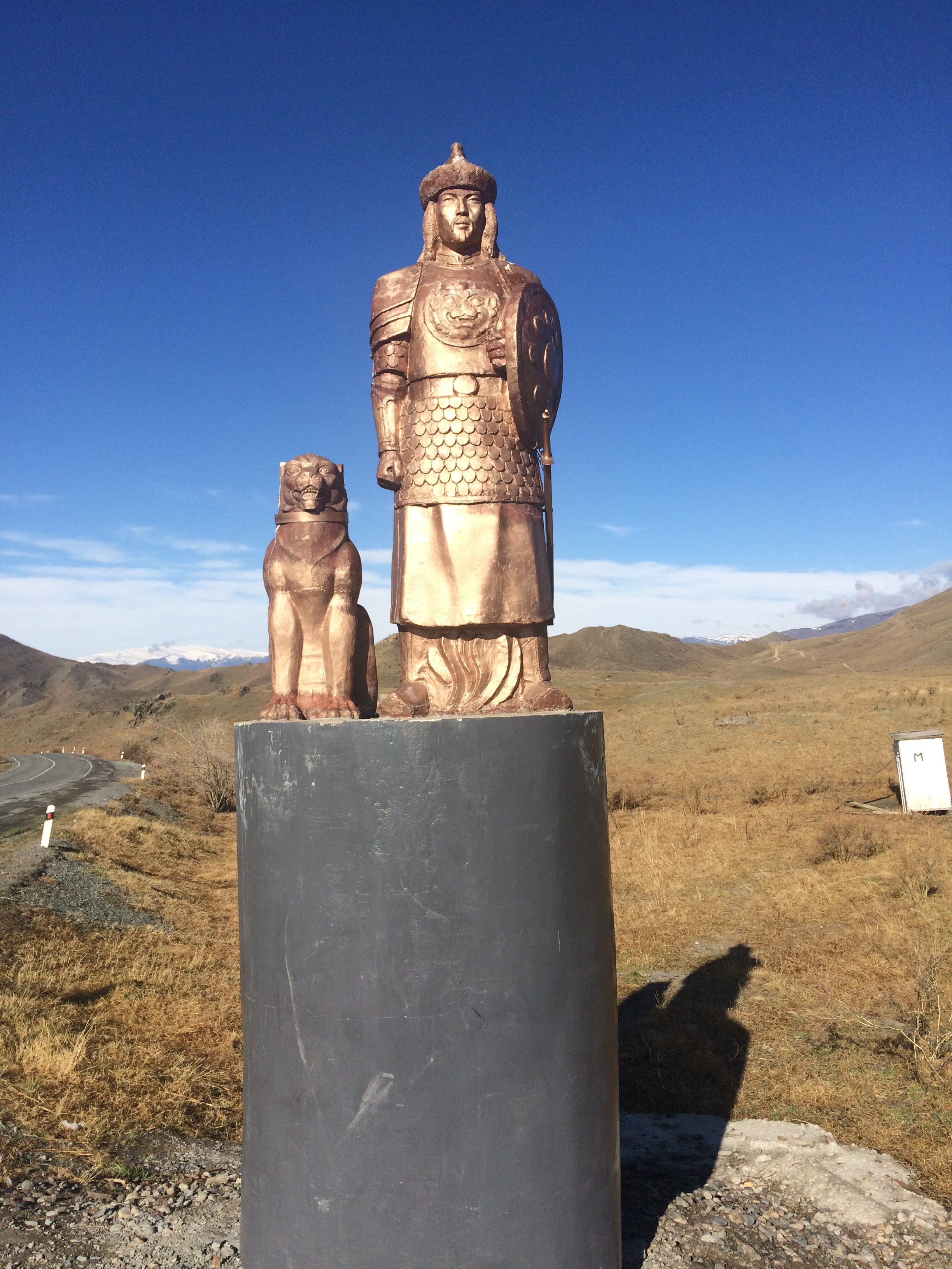 У въезда на Бай-Тайгинский кожуун Республики Тыва. Памятник Сүбедею (Субэдэю)